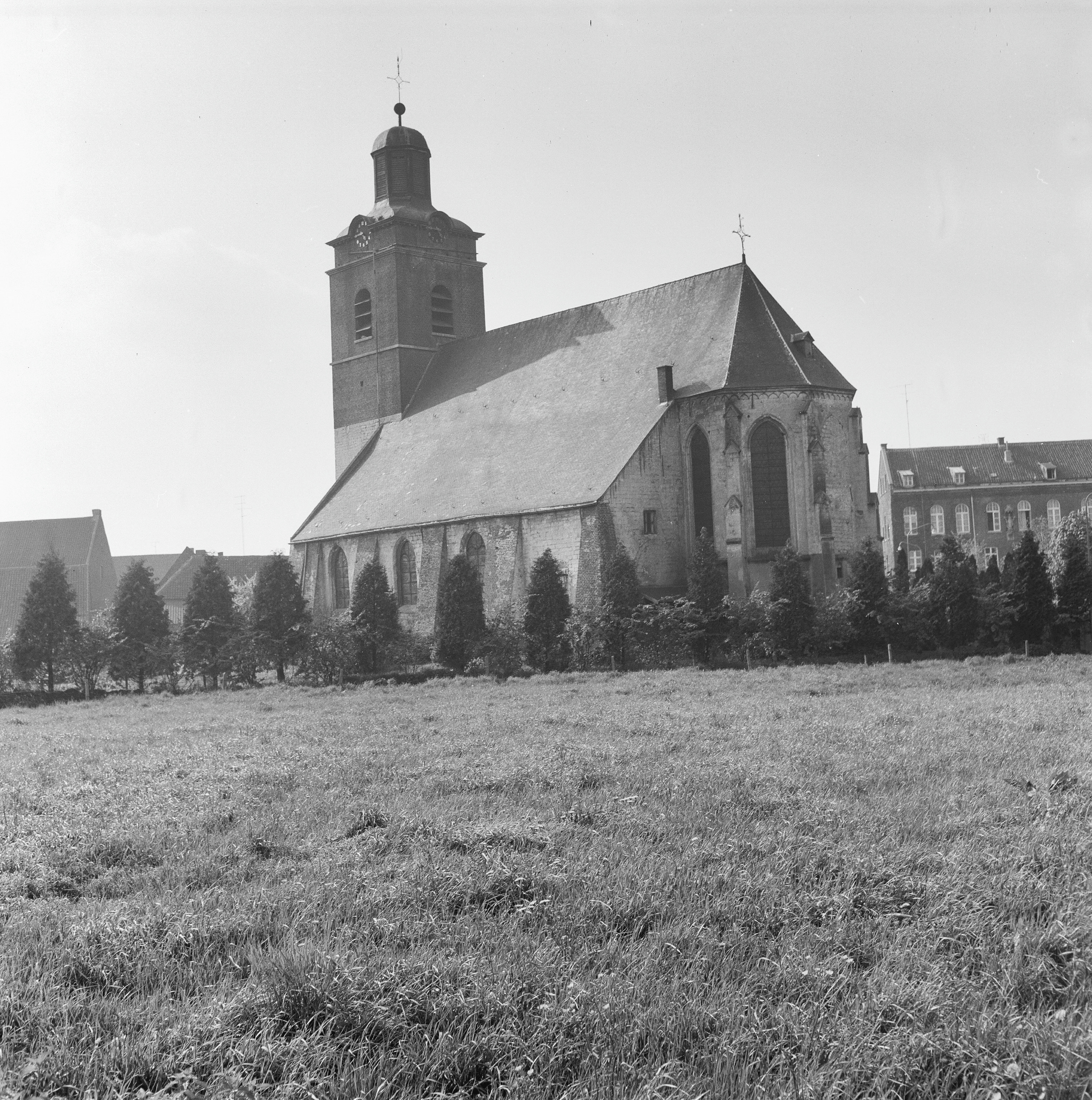 Rooms-Katholieke Kerk: exterieur